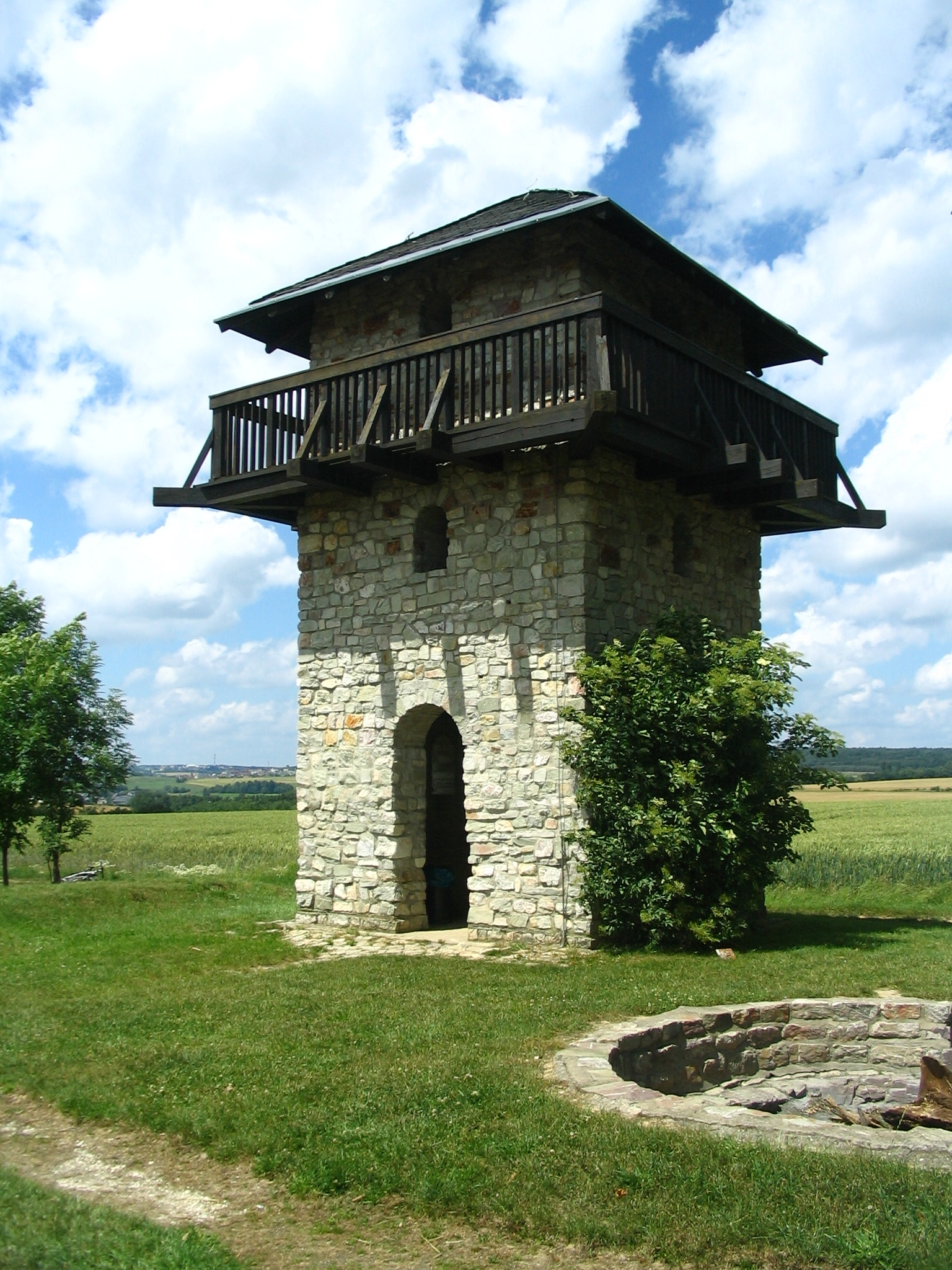 Römerturm an der Ausoniusstrasse bei Dill und Niedersohren, Hunsrück